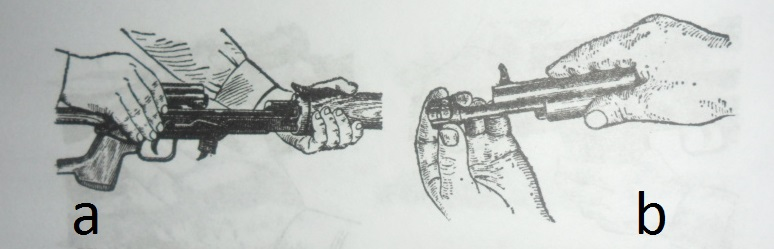 Handhabung des SWD-Scharfschützengewehres.